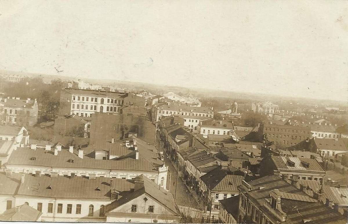 Беларуская (тарашкевіца): Менск (Miensk), вуліца Дамініканская (vulica Daminikanskaja). Панарама з касьцёла Сьвятога Тамаша Аквінскага